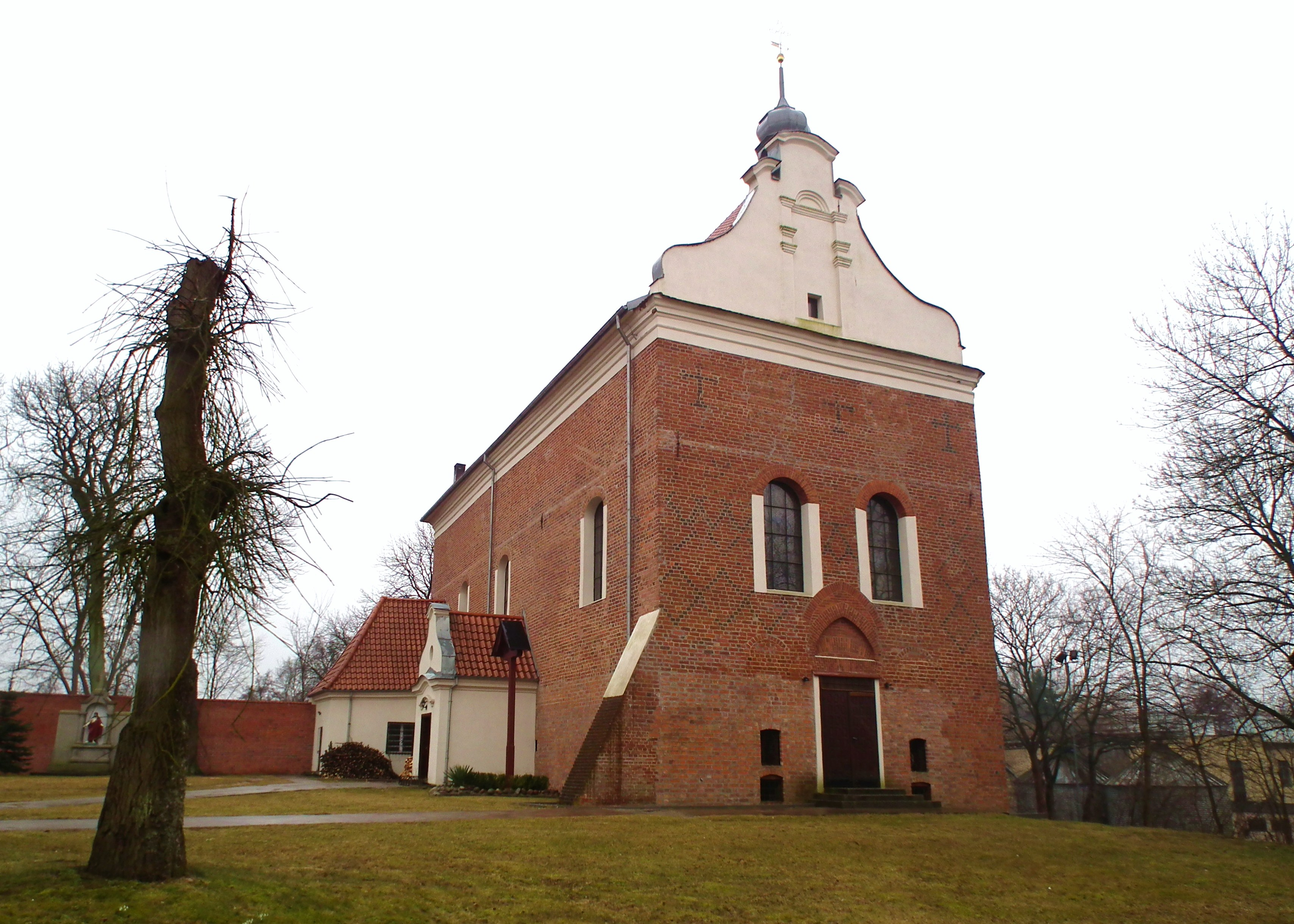 Kościół św. Anny w Krajence wraz z otoczeniem.